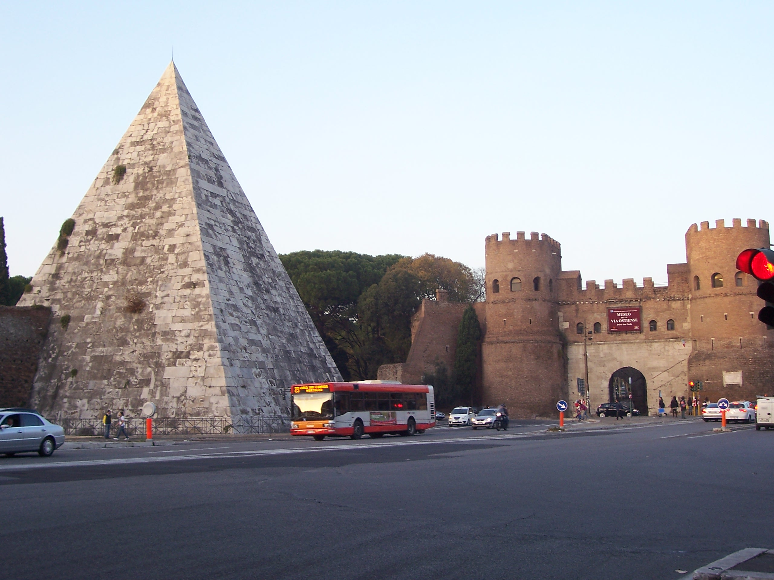 Piazza di Porta San Paolo con l'omonima porta sulla destra e la Piramide di Caio Cesto